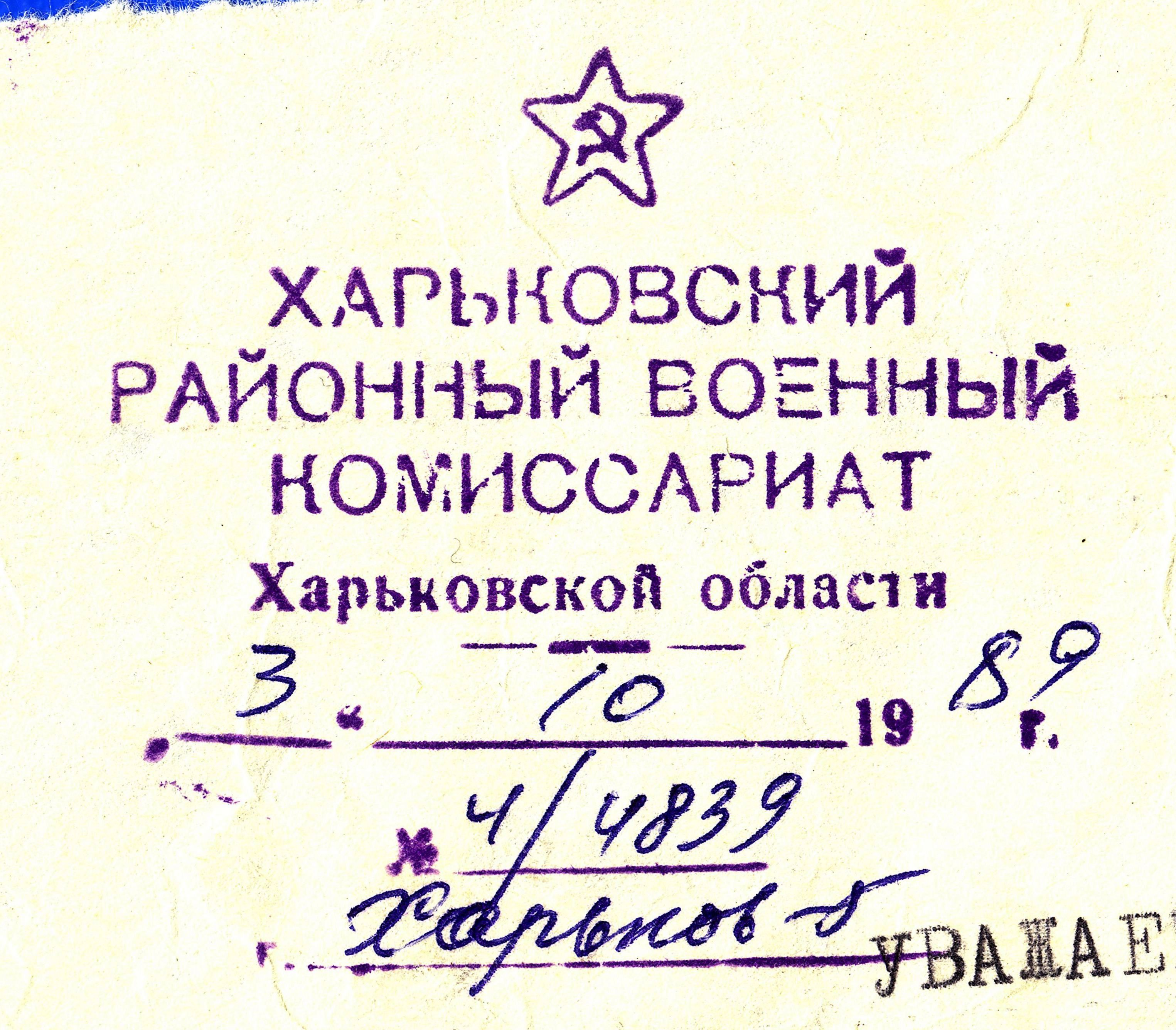 Официальное письмо и угловой штамп Харьковского районного военного комиссариата. 1989 год.